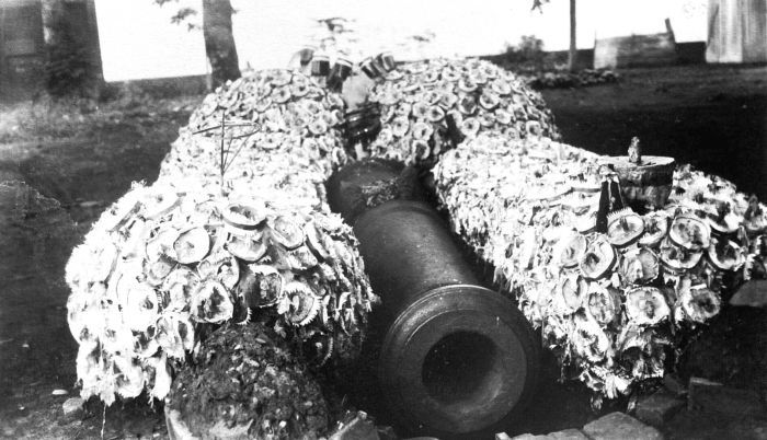 Meriam Si Jagur yang dikeramatkan, diberi sesajian. Meriam ini sekarang terdapat di muka Museum Sejarah Jakarta, di kawasan Kota Tua Jakarta